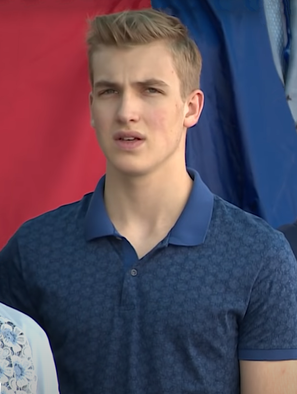 Nikolai Lukashenko